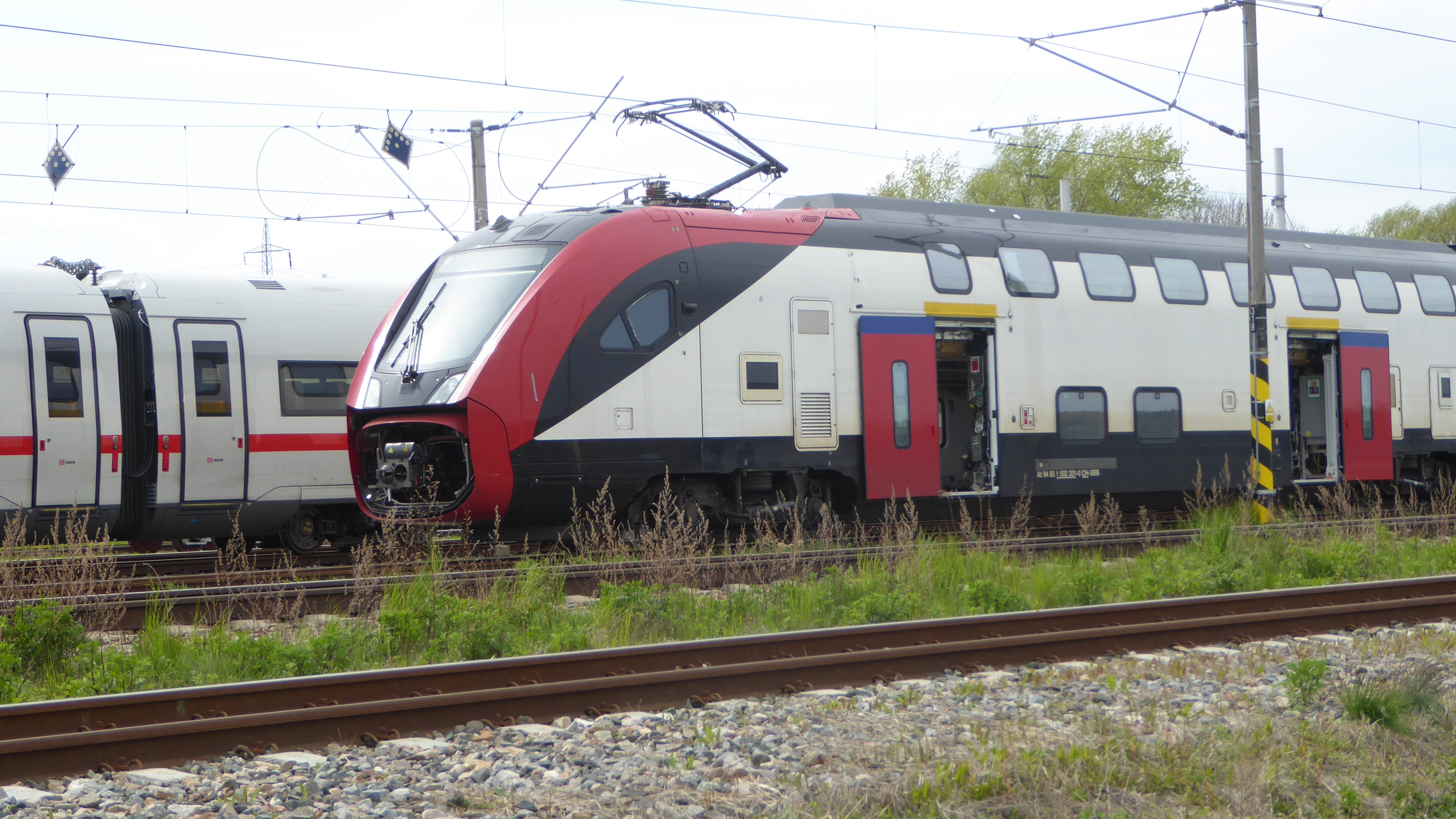 Steuerwagen At 94 85 1 502 201-0 eines Twindexx Swiss Express SBB RABe 502 auf dem Eisenbahnversuchsring Velim (CZ)